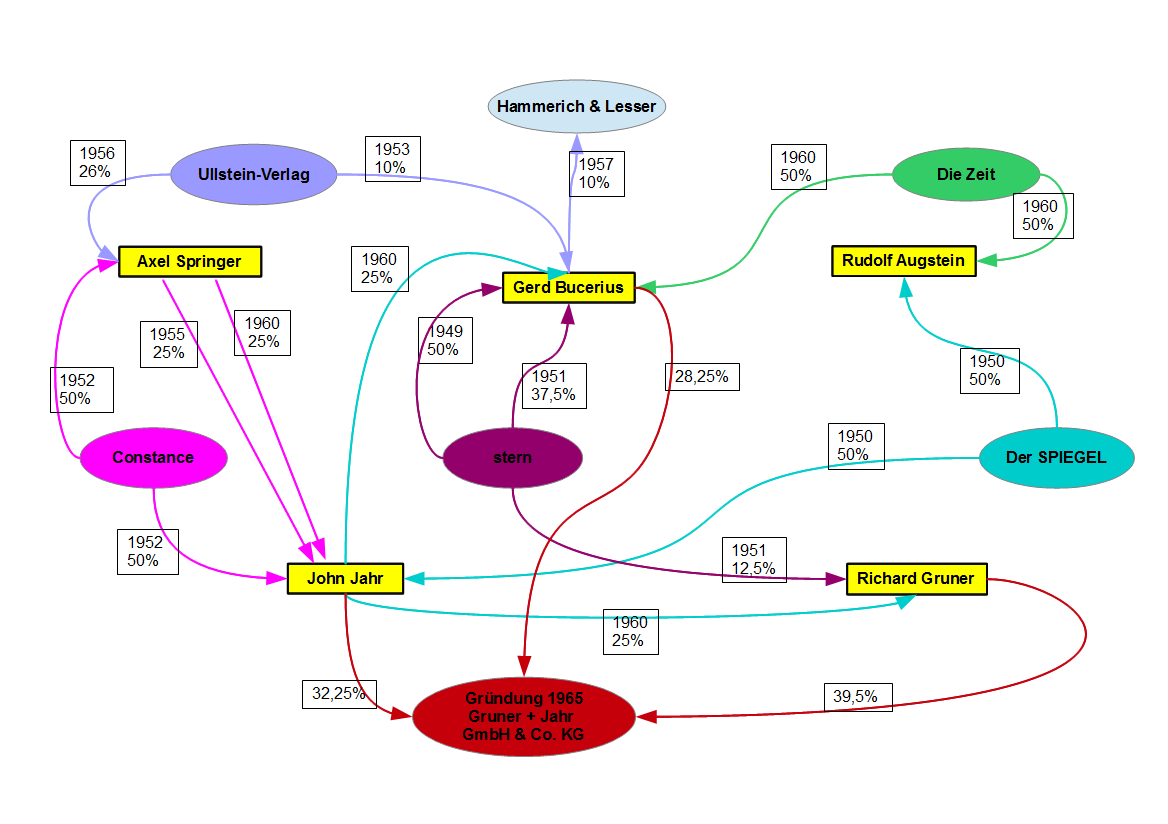 Diese Schaubild zeigt die frühen wirtschaftlichen Verflechtungen der Mitglieder der so genannten Hamburger Kumpanei, Axel Springer, Gerd Bucerius, Rudolf Augstein, Richard Gruner und John Jahr.